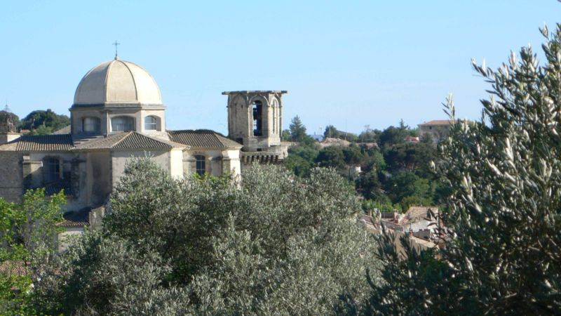 Notre Dame de l'Assomption de Lambesc (13)